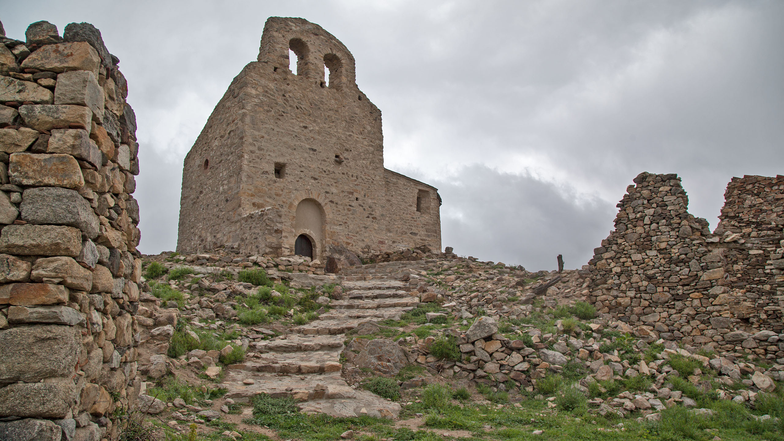 Chapelle Saint Etienne